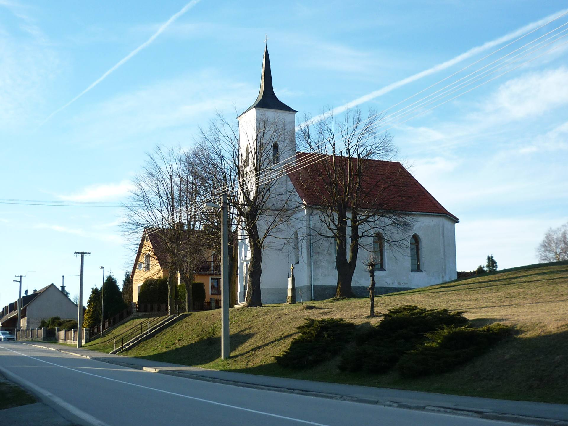 Horní kostel novogotický katolický Panny Marie ve Valtínově